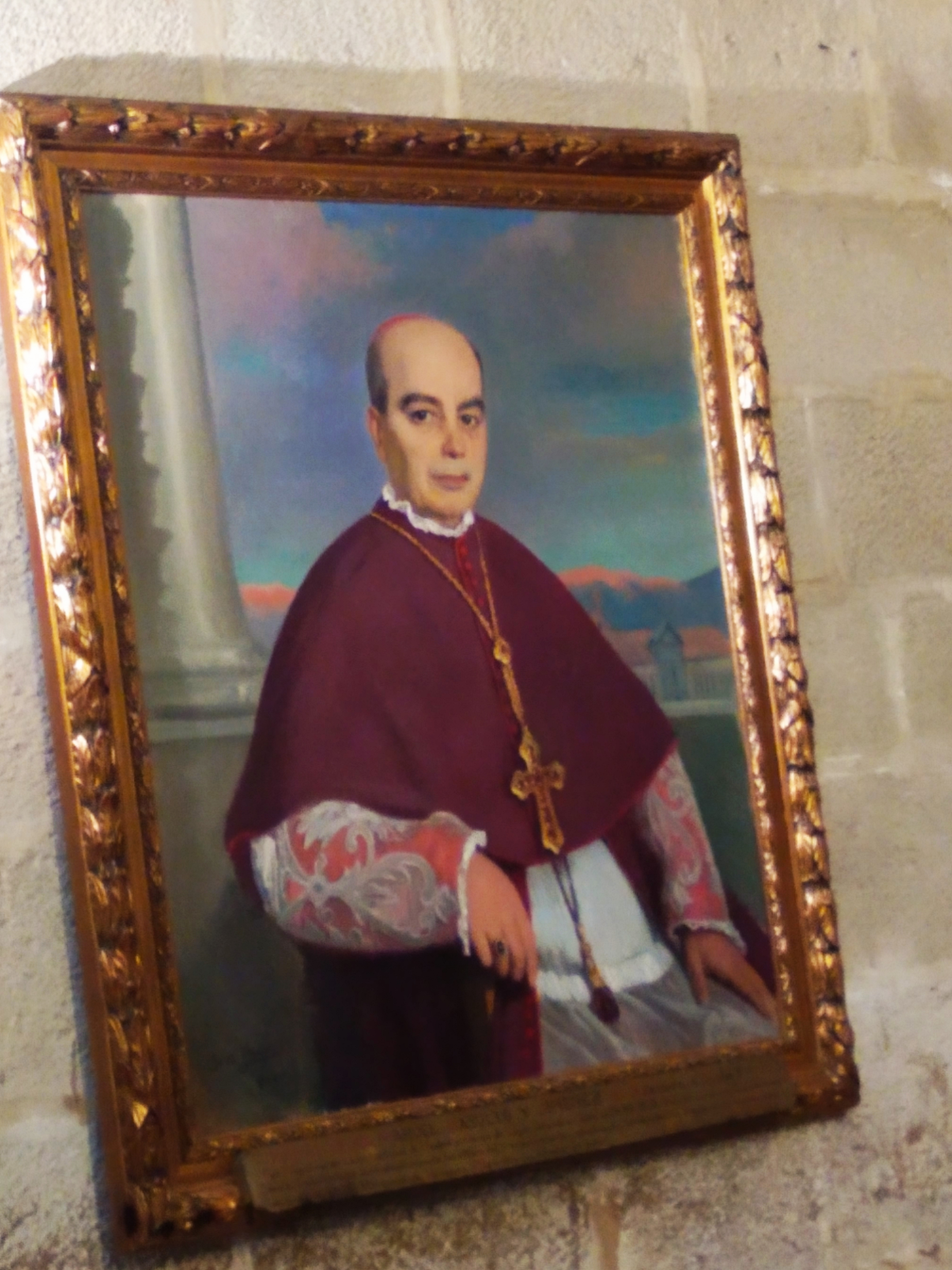 Cuadro del Beato Manuel Basulto en la catedral de Jaén, obra de José Nogué.